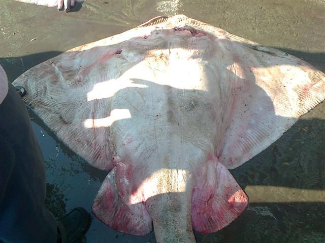 вид скатов рода хвостоколов